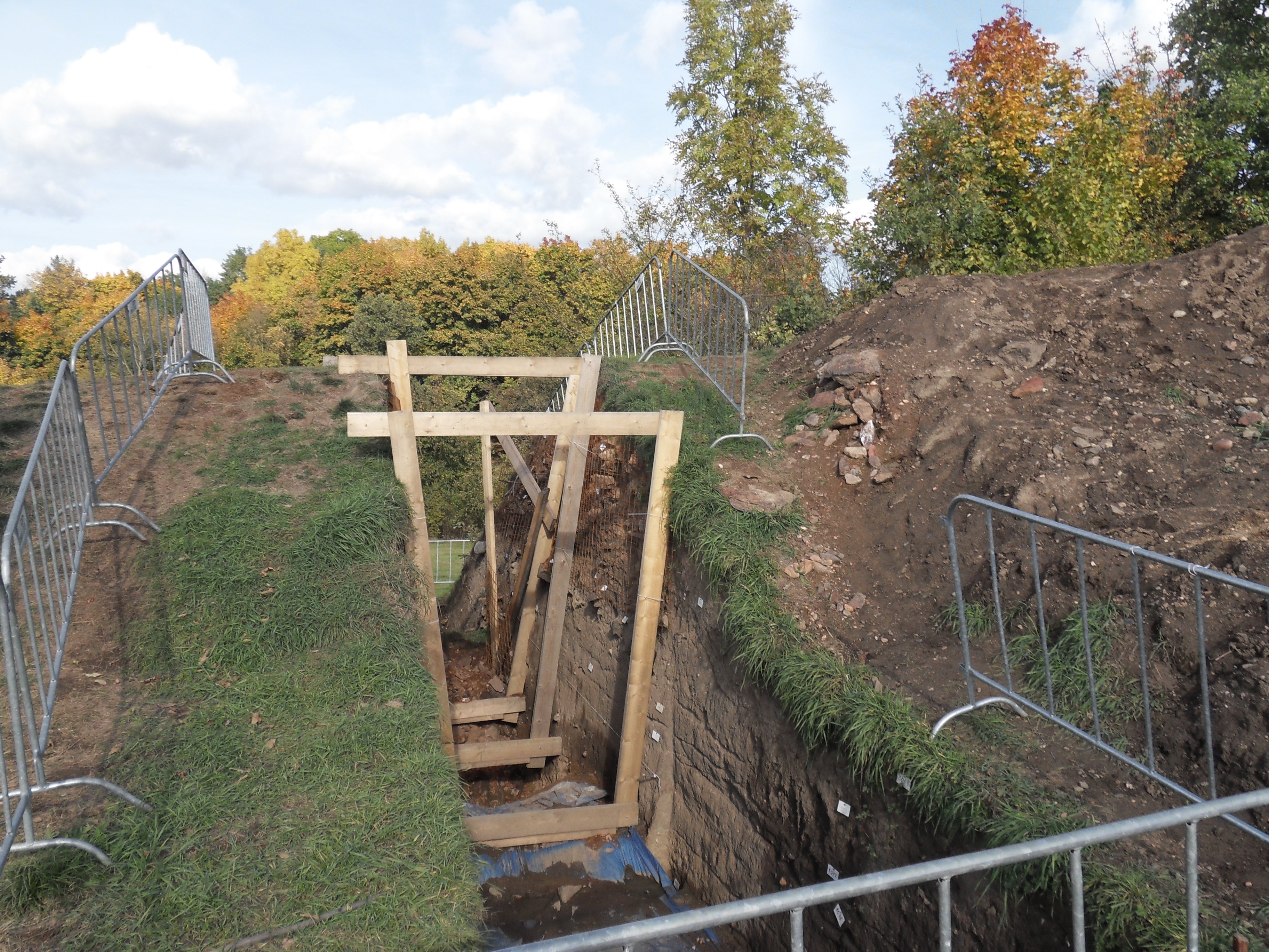 Průzkum v roce 2012 - Hradiště, severovýchodně od městské části Hradiště, Hradiště (Plzeň).